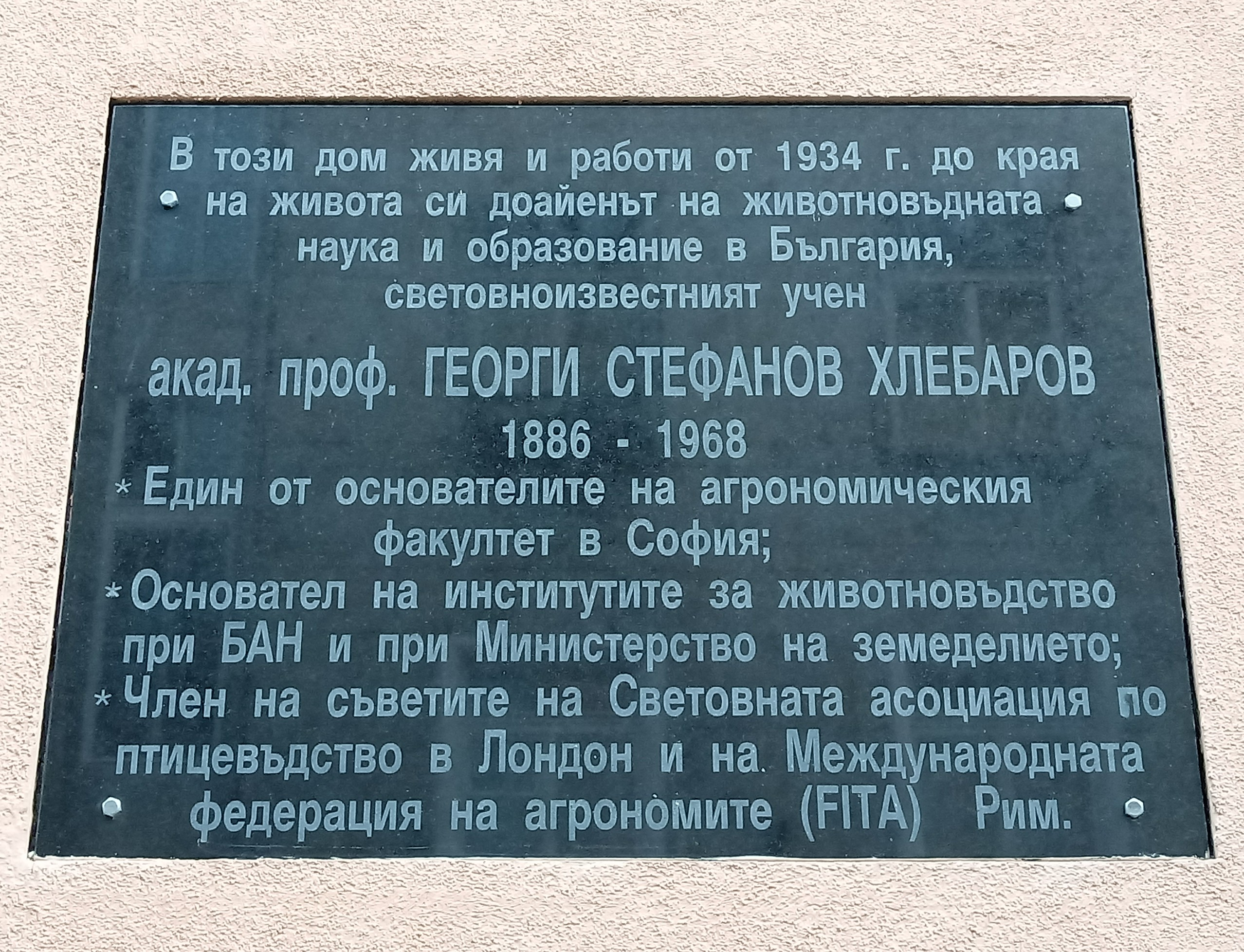 Georgi Hlebarov memorial plaque, 7 Angelo Roncalli Str. Sofia